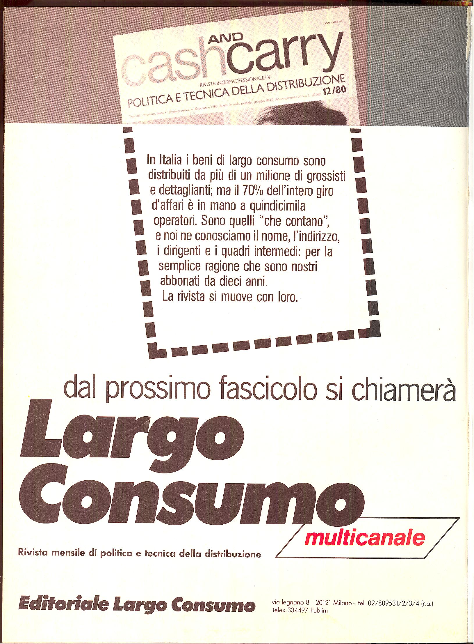 Dicembre 1980: la "quarta di copertina" dell'ultimo fascicolo del mensile economico Cash & Carry. Il numero successivo muterà la testata in Largo Consumo